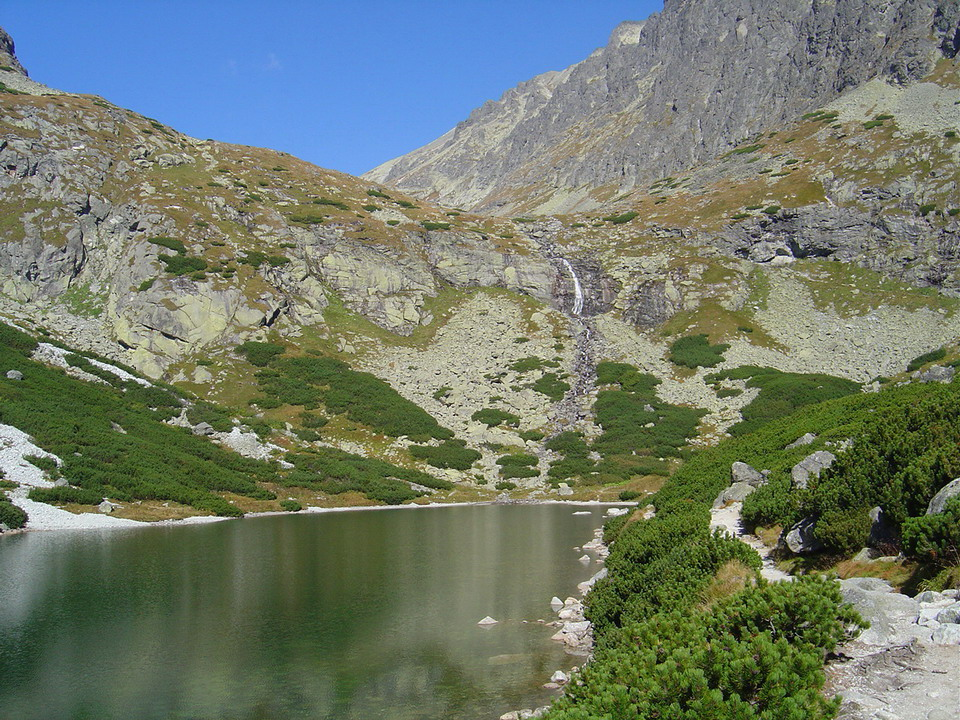 Velicky vodopad over Velicke pleso